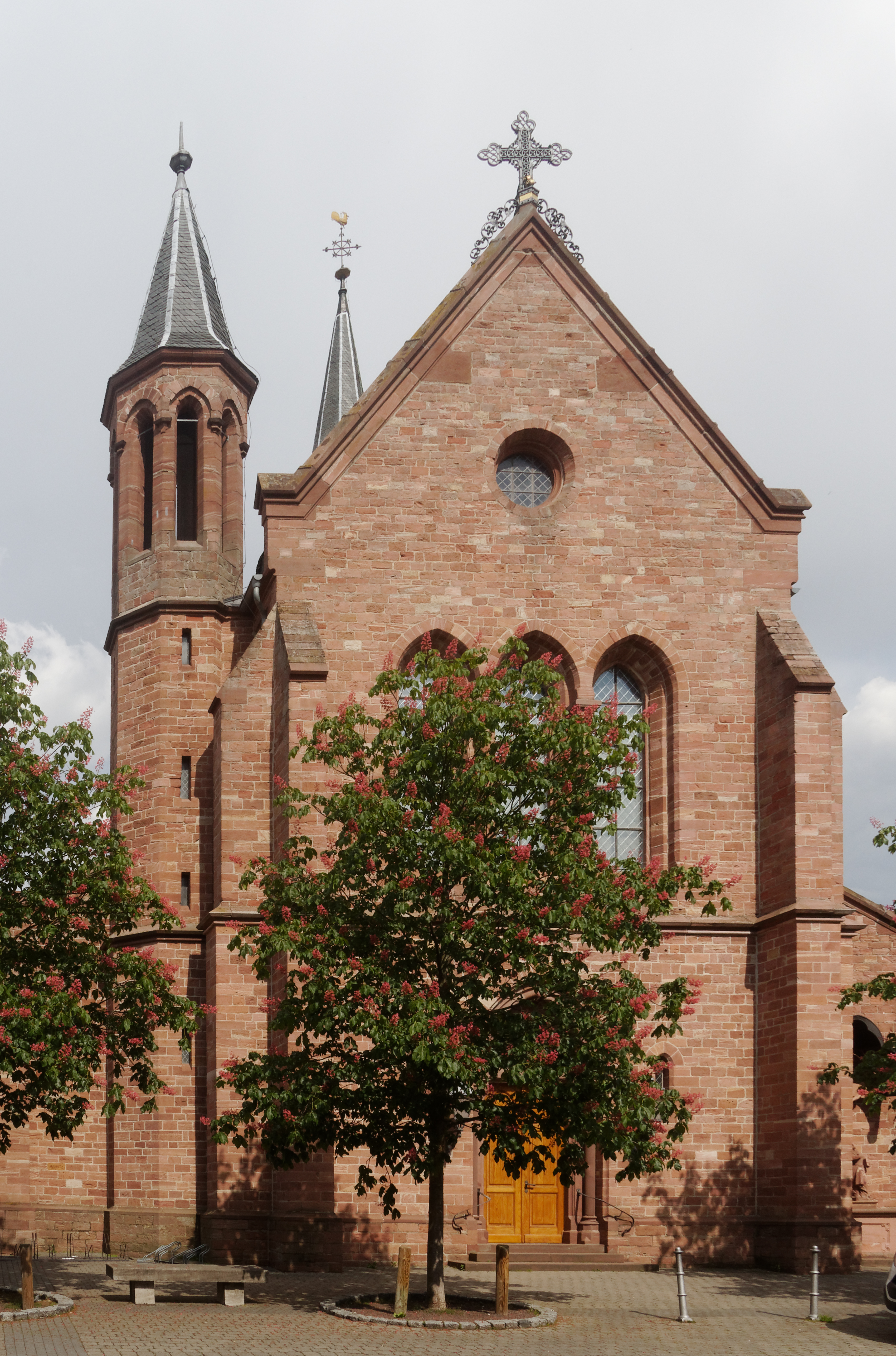 Portalfassade der katholischen Kirche St. Nikolaus in Jügesheim (Rodgau, Hessen) mit blühenden Kastanienbäumen.